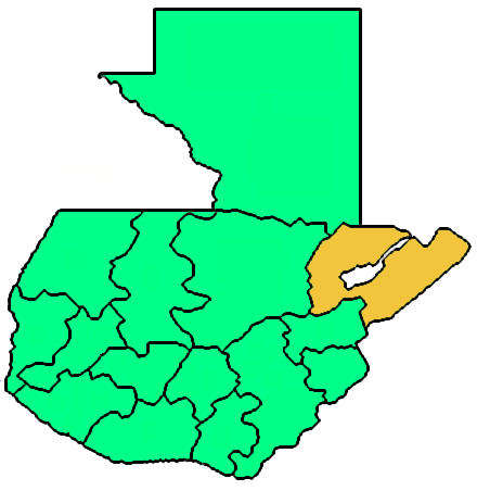 Mappa del vicariato apostolico di Izabal, in Guatemala. Lavoro personale eseguito a partire da questa immagine di Commons. Fonte per i confini delle diocesi